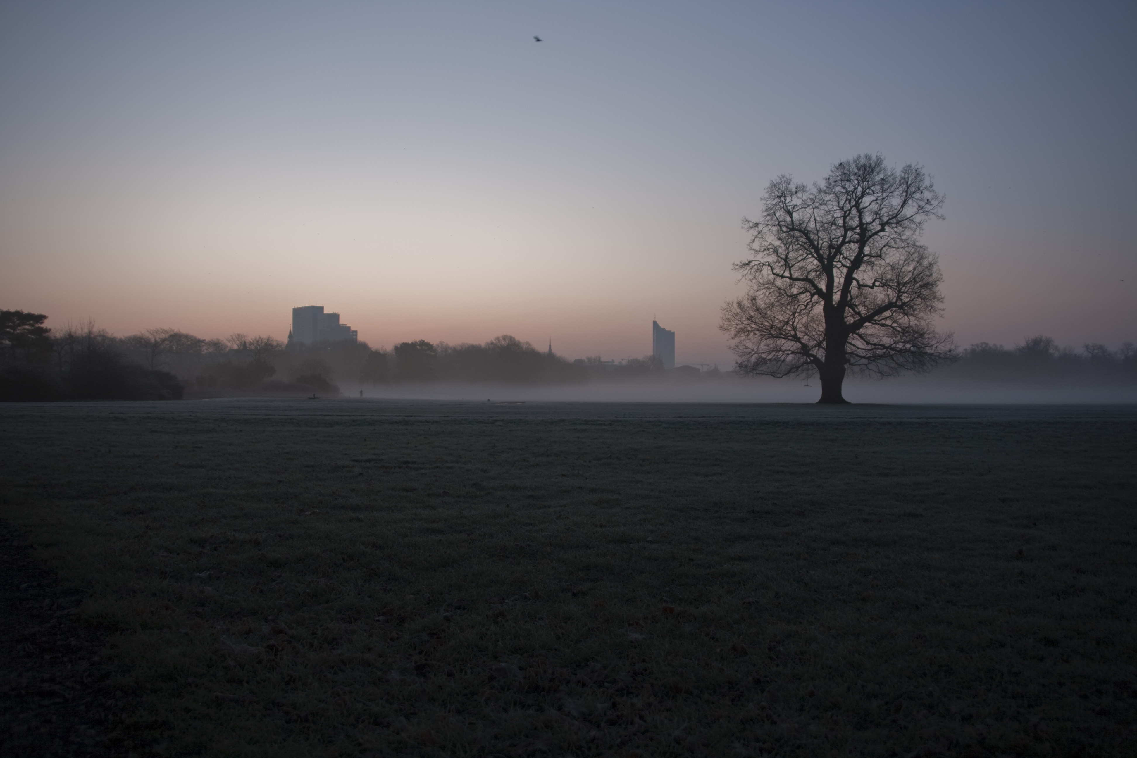 Sonnenaufgang im Leipziger Rosental